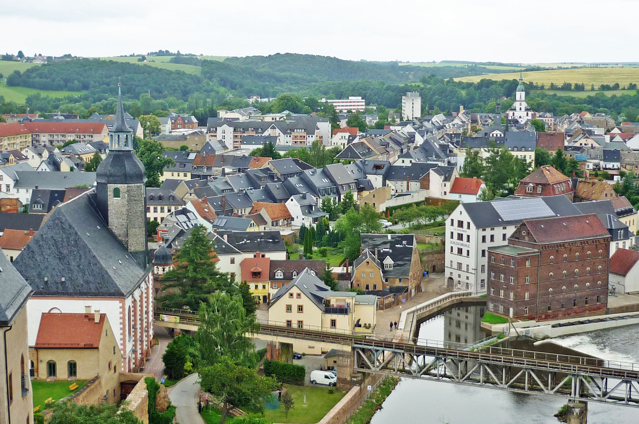 Blick vom Schloss Rochlitz auf die Stadt Rochlitz in Sachsen